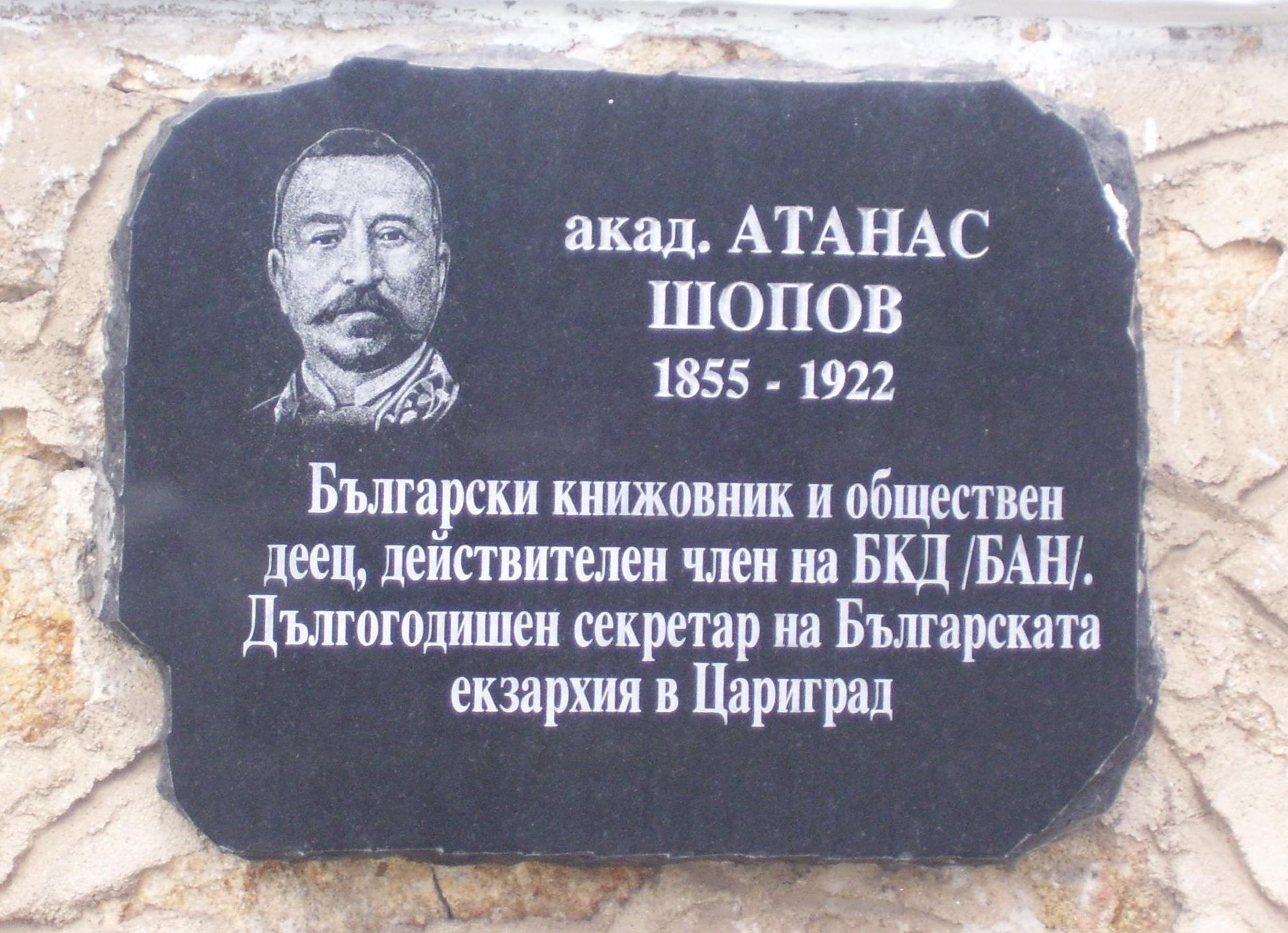 Паметна плоча на Атанас Шопов в родното му Панагюрище.